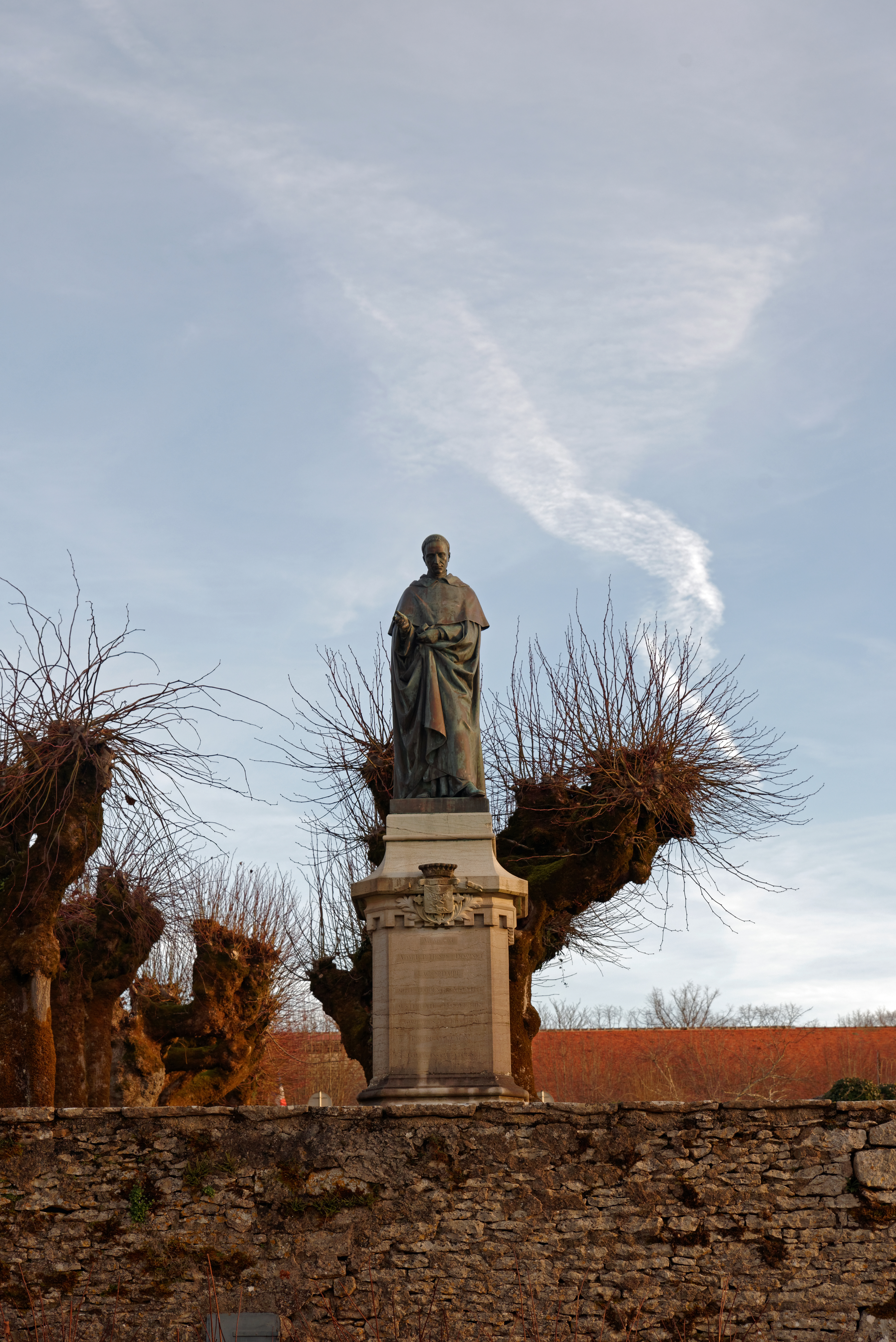 Statue du père Lacordaire à Flavigny-sur-Ozerain (Côte d'Or, Bourgogne-Franche-Comté, France).